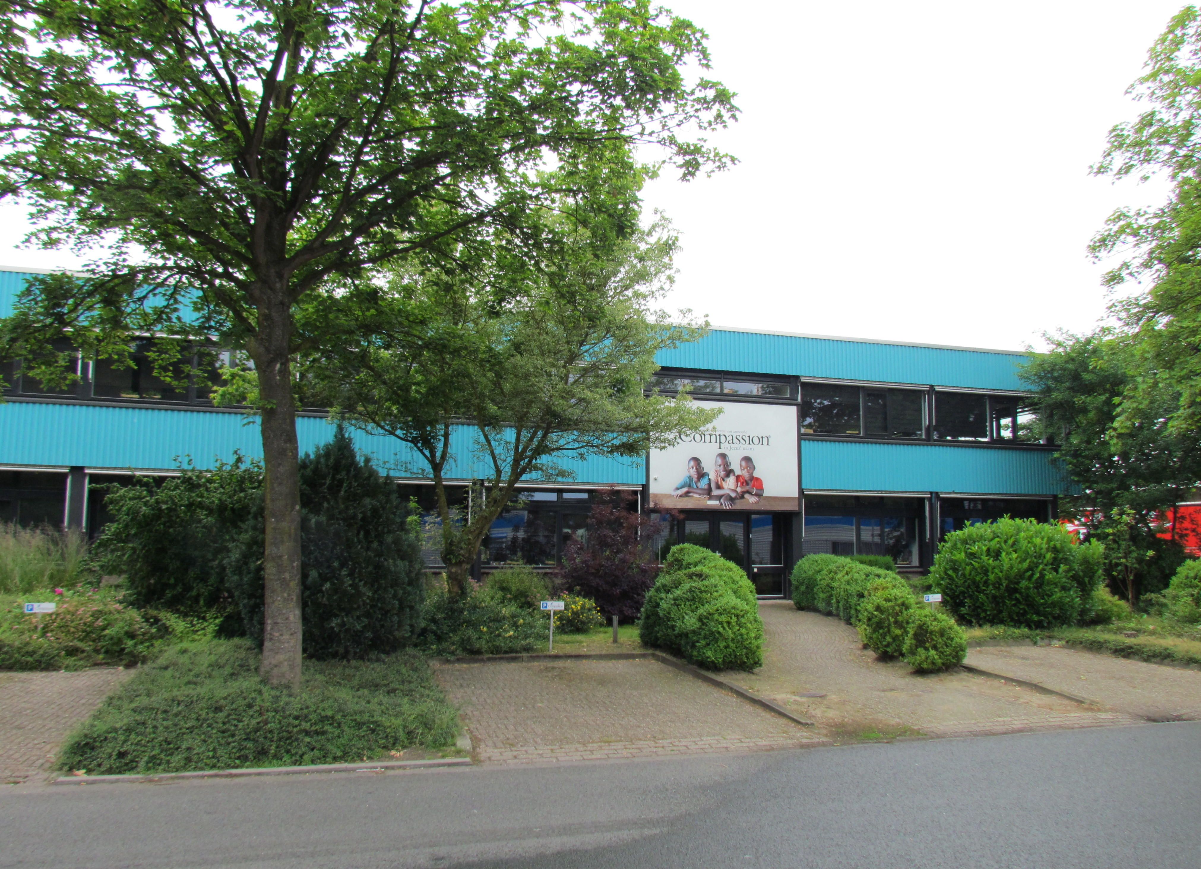 Kantoor van Compassion Nederland (Zwaansprengweg, Apeldoorn)